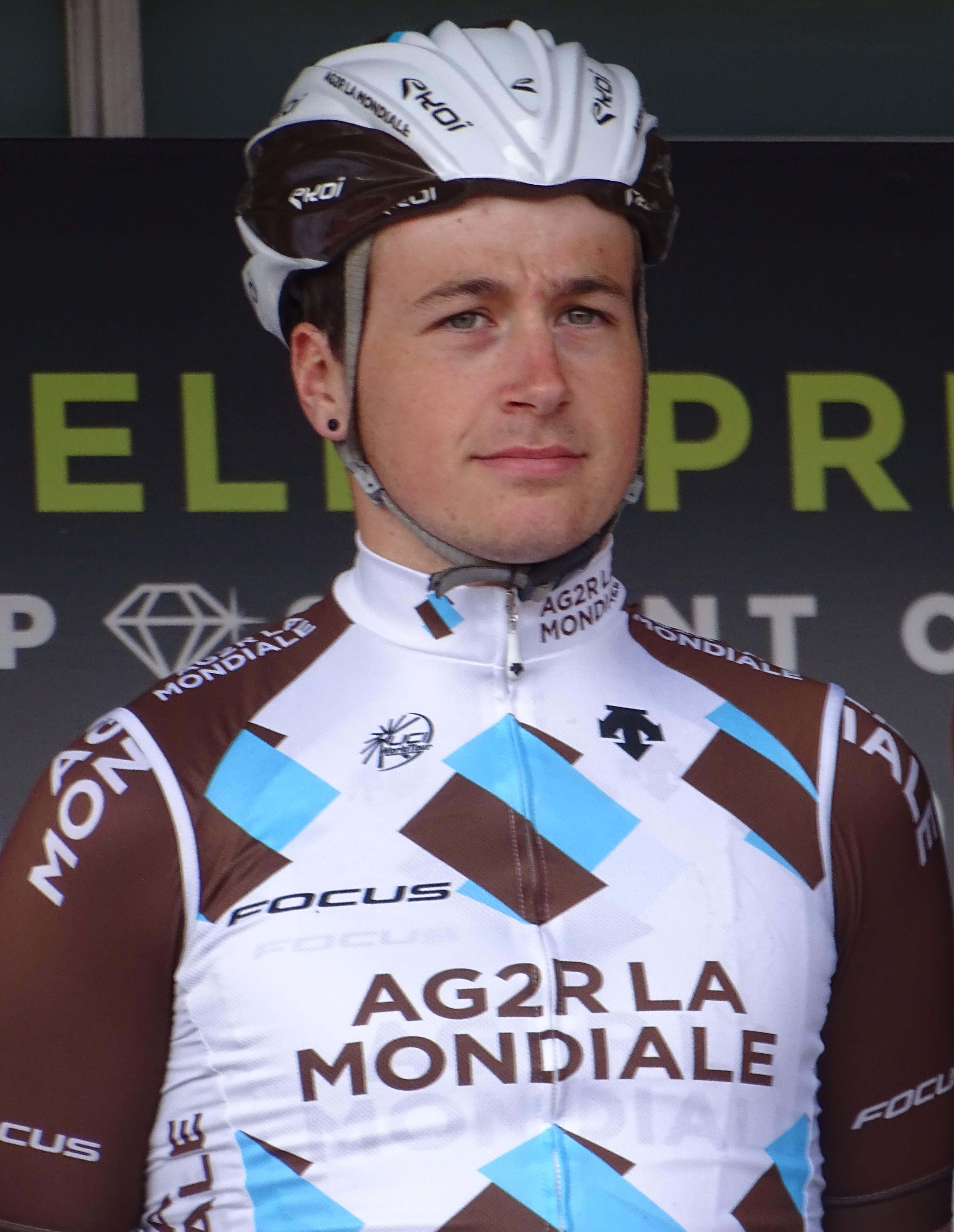 Reportage réalisé le mercredi 8 avril à l'occasion du départ du Grand Prix de l'Escaut 2015 à Anvers, Belgique.